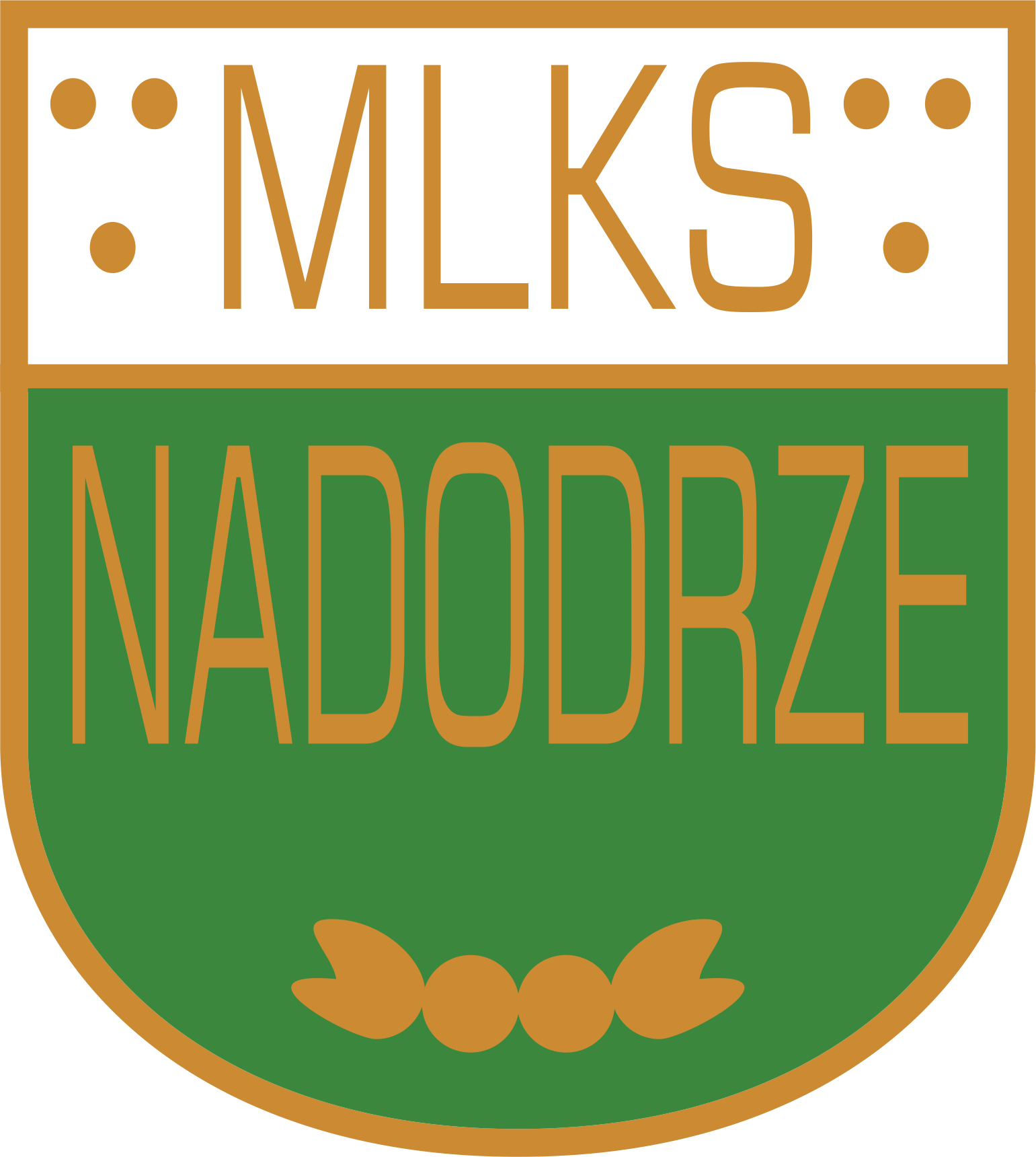 Logo Miejskiego Ludowego Klubu Sportowego Nadodrze. Praca własna opracowana na podstawie dokumentów archiwalnych.